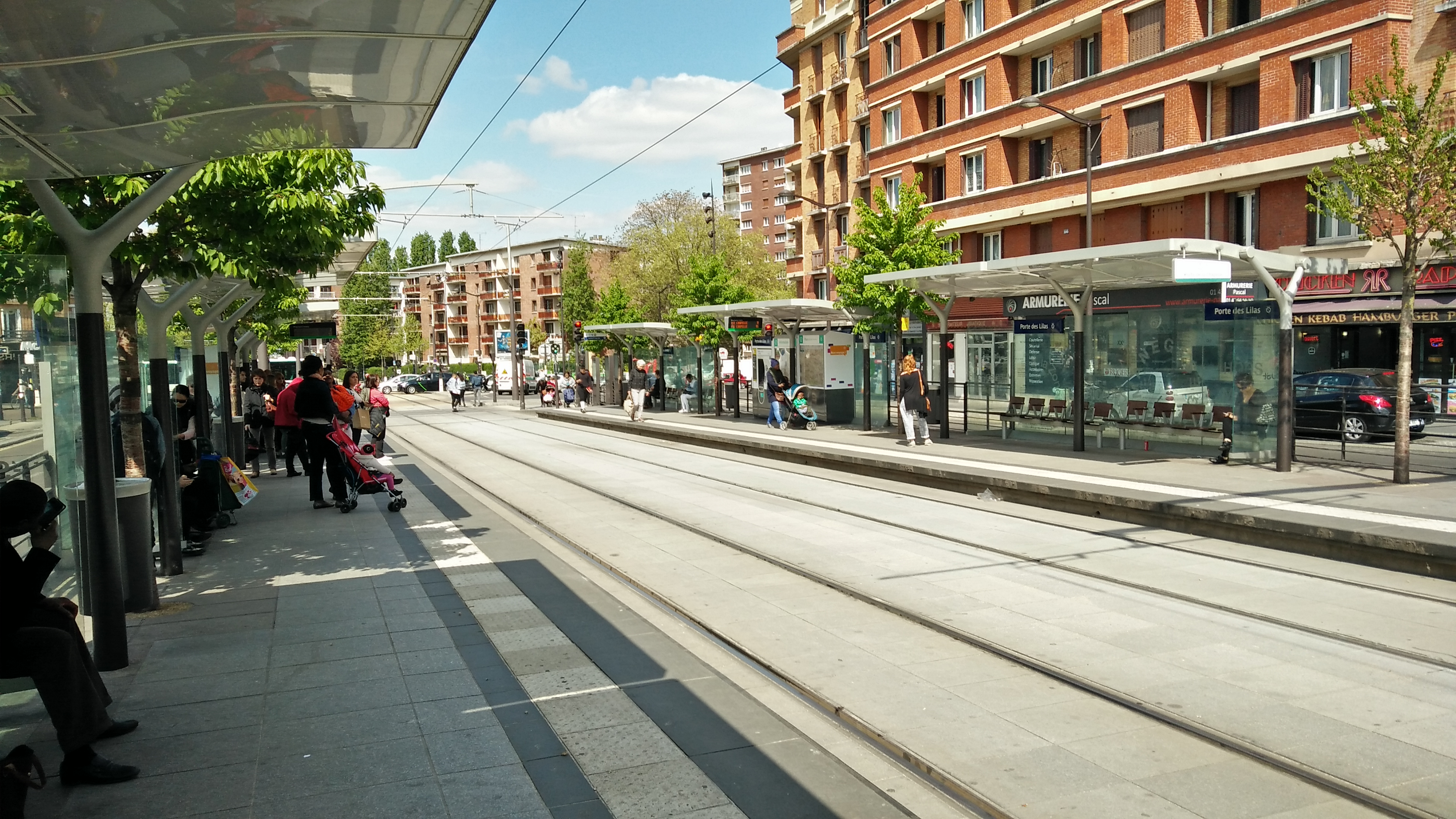 Arrêt de tramway Porte des Lilas, de la ligne T3b